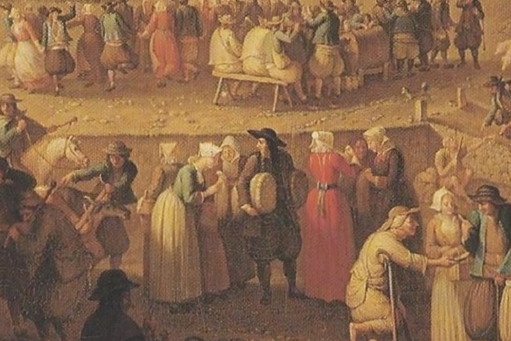 detail: costume féminin